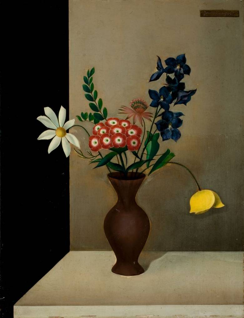 Blumenstilleben. Um 1930. Öl auf Holz. 41,8 x 32,2 cm